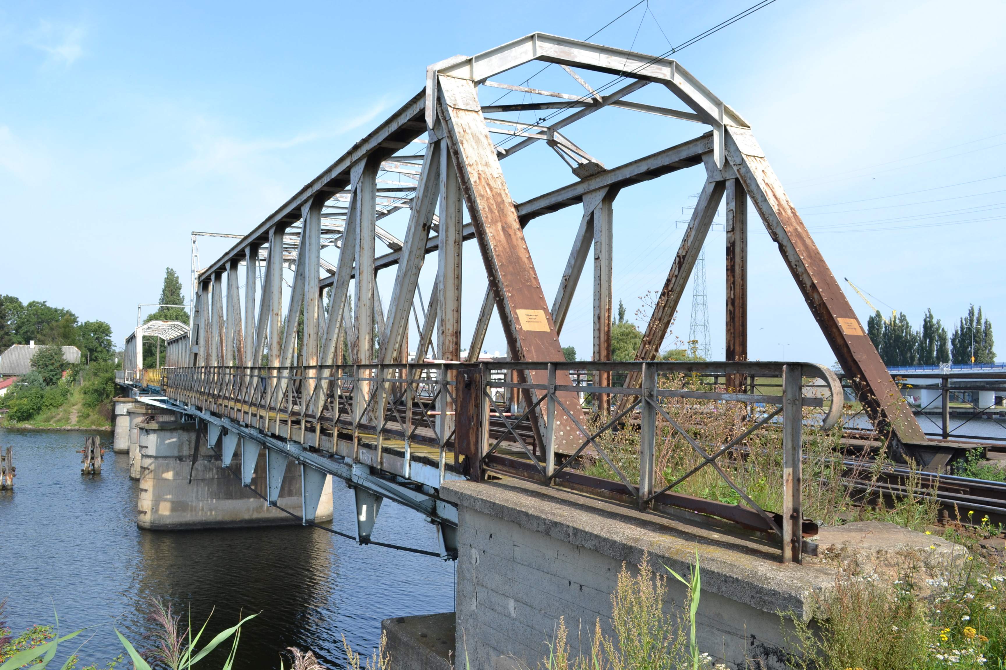 Obrotowy most kolejowy w Gdańsku